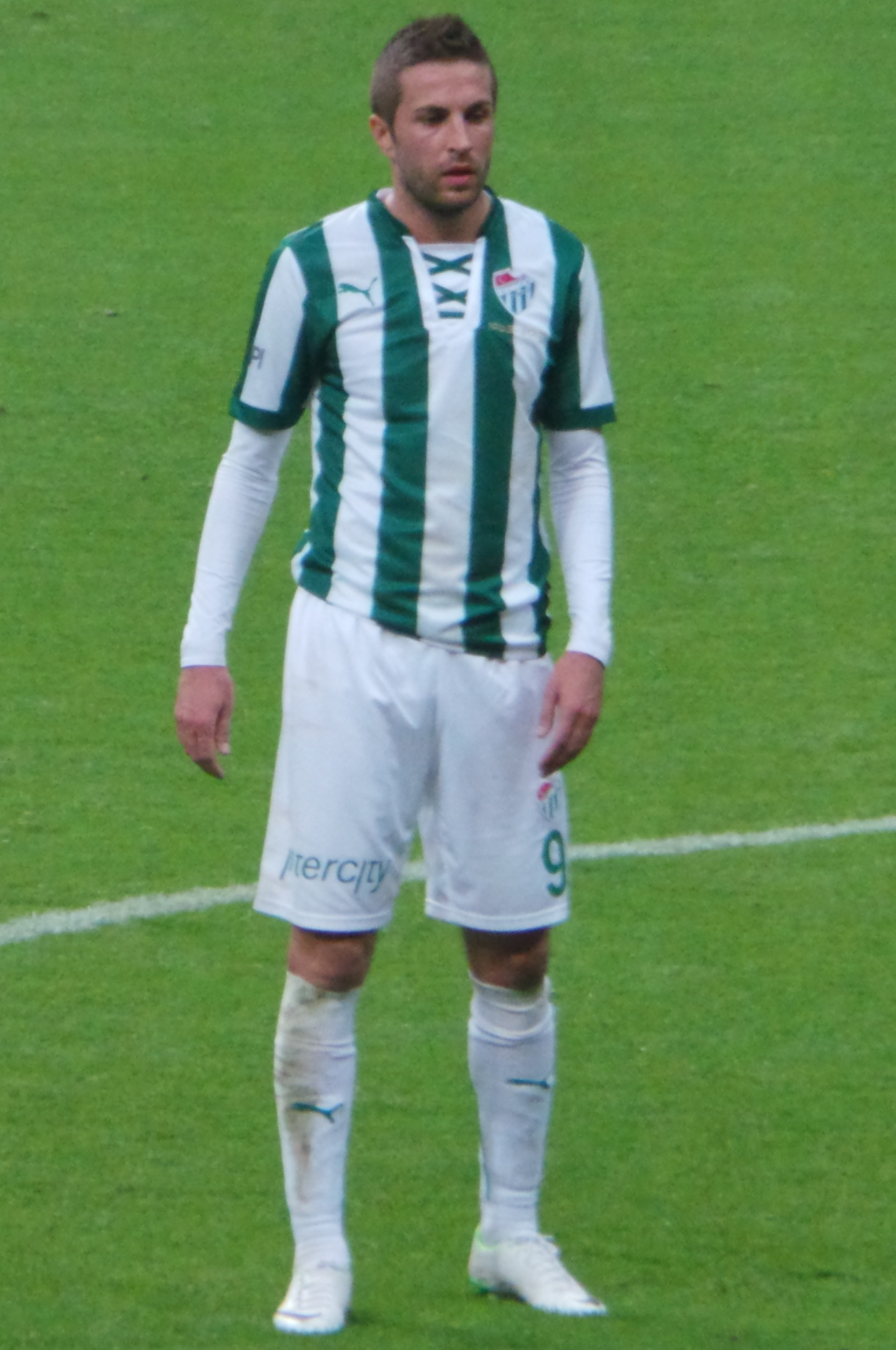 Stanislav Šesták